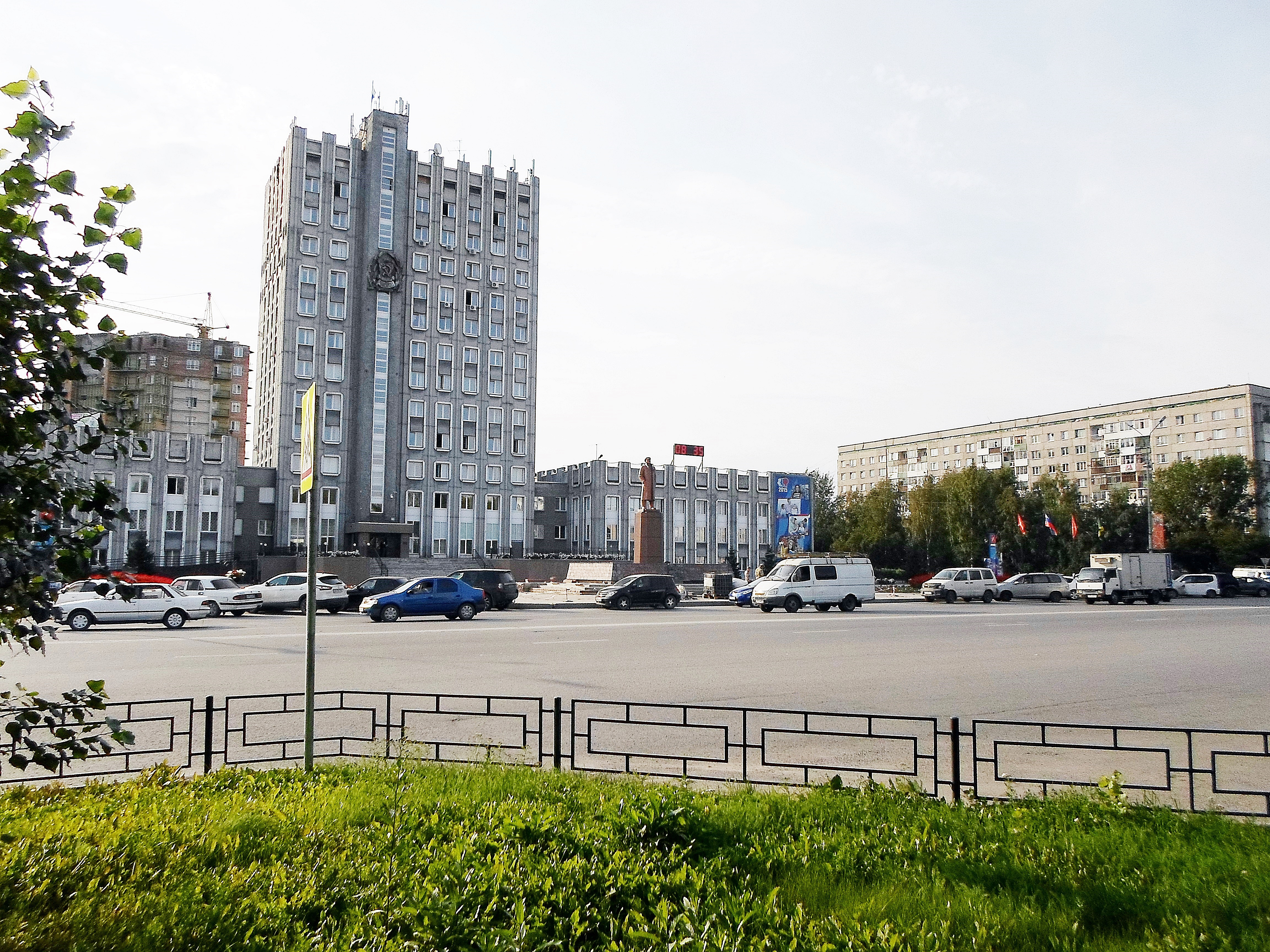 Администрация города Ачинска.